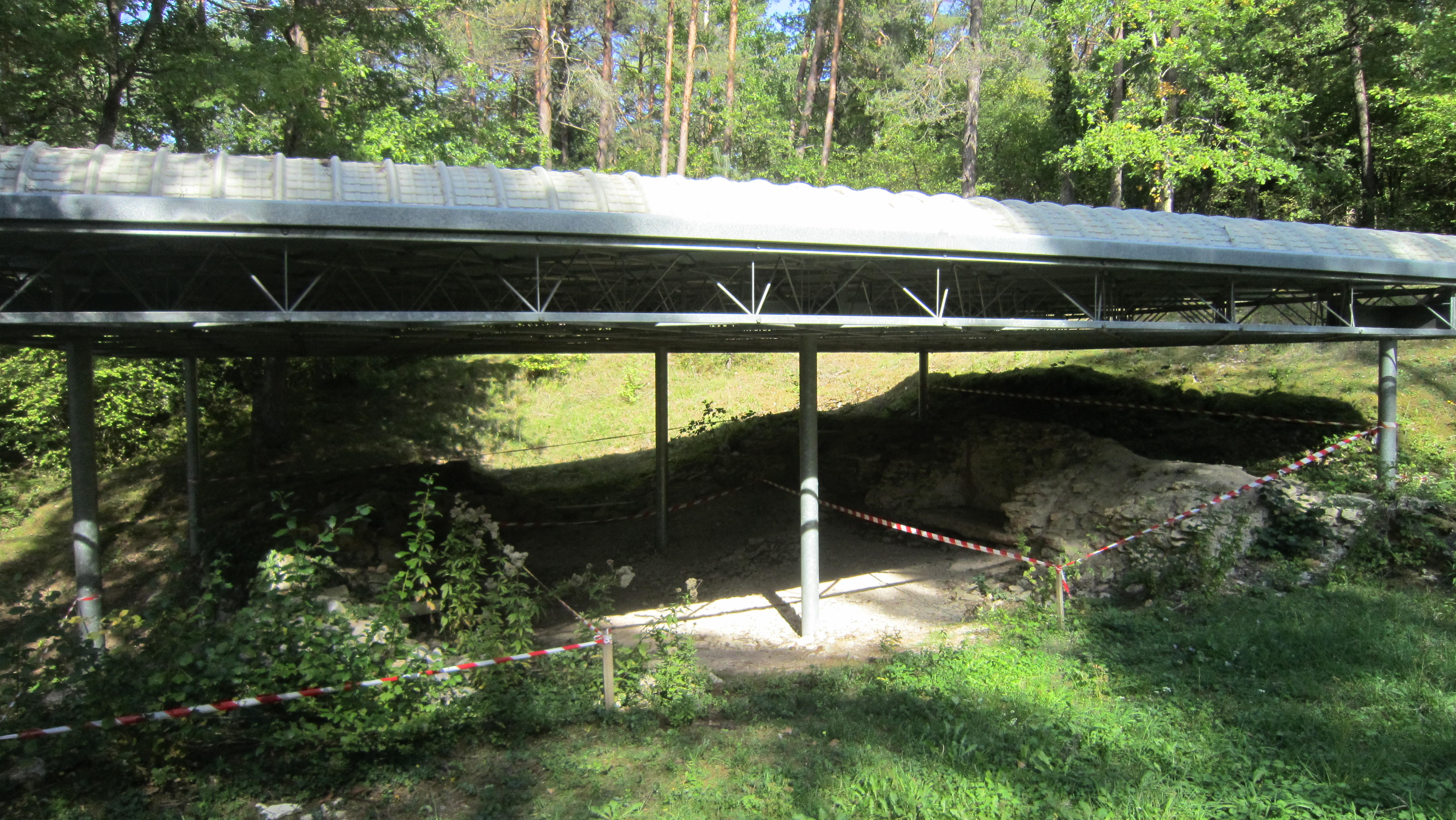 Les thermes gallo-romains de Vertillum sur la commune de Vertault (Côte-d'Or)